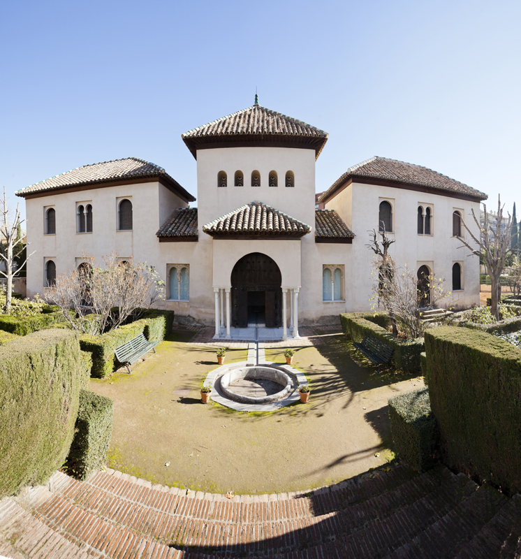 Palacete de Alcázar Genil (Granada), sede de la Fundación Francisco Ayala.